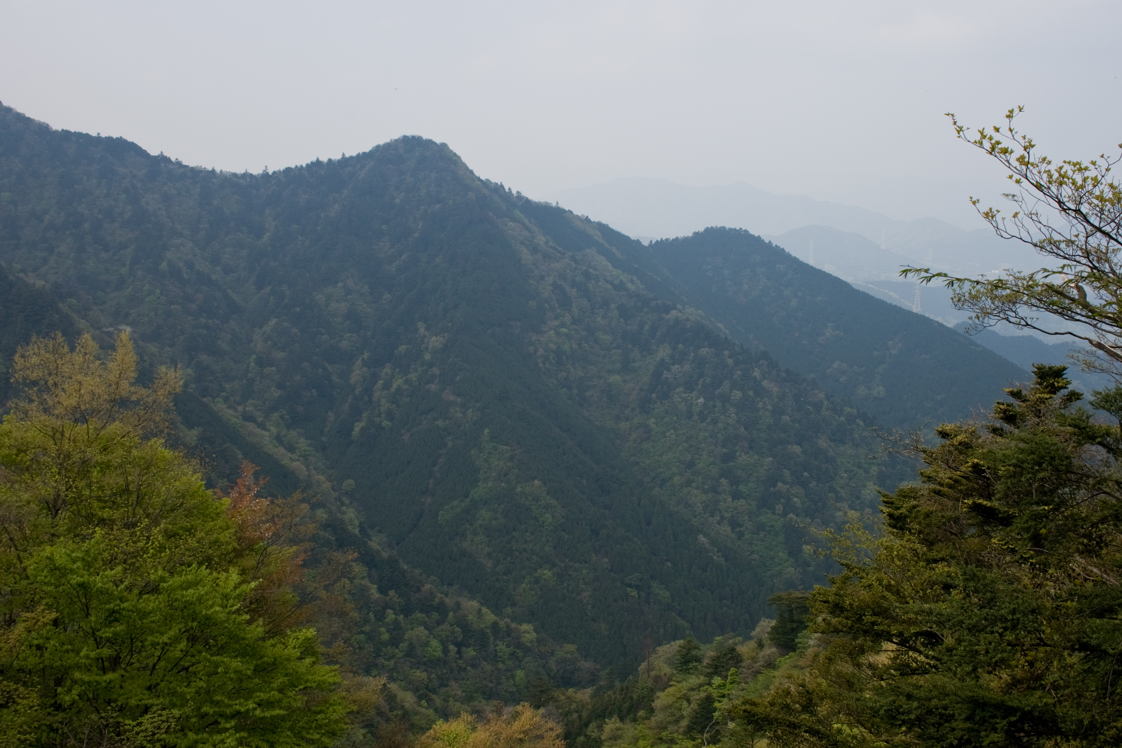 高畑山付近より望む栂立ノ頭